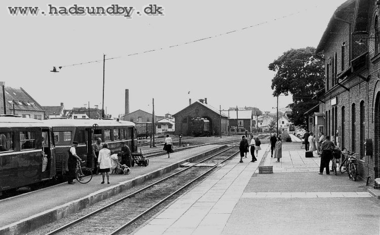 Hadsund Nord Station den sidste drift dag den 31. marts 1969